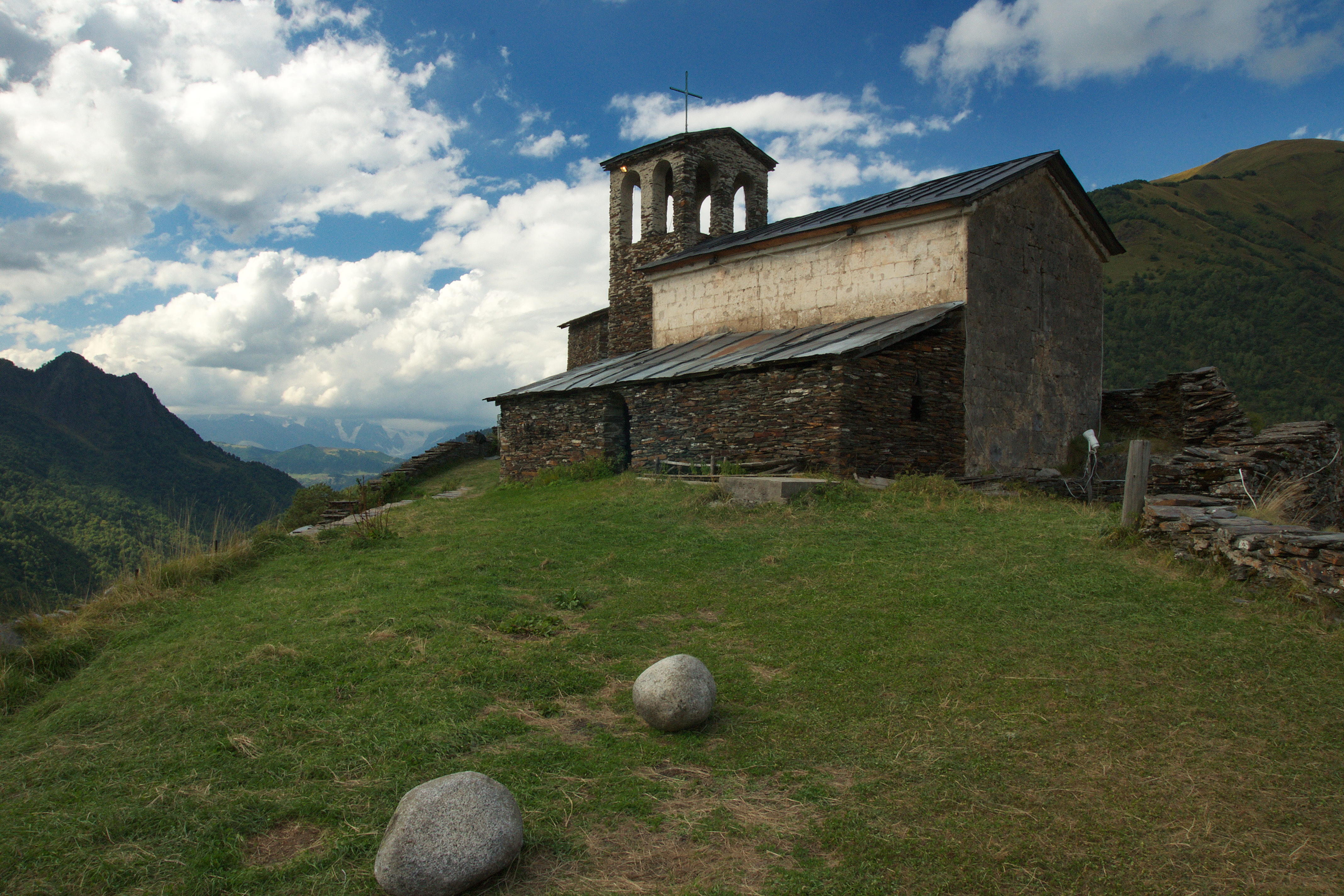 წმ. კვირიკეს და ივლიტას ეკლესია „ლაგვირკა“, სოფელი ჴე.